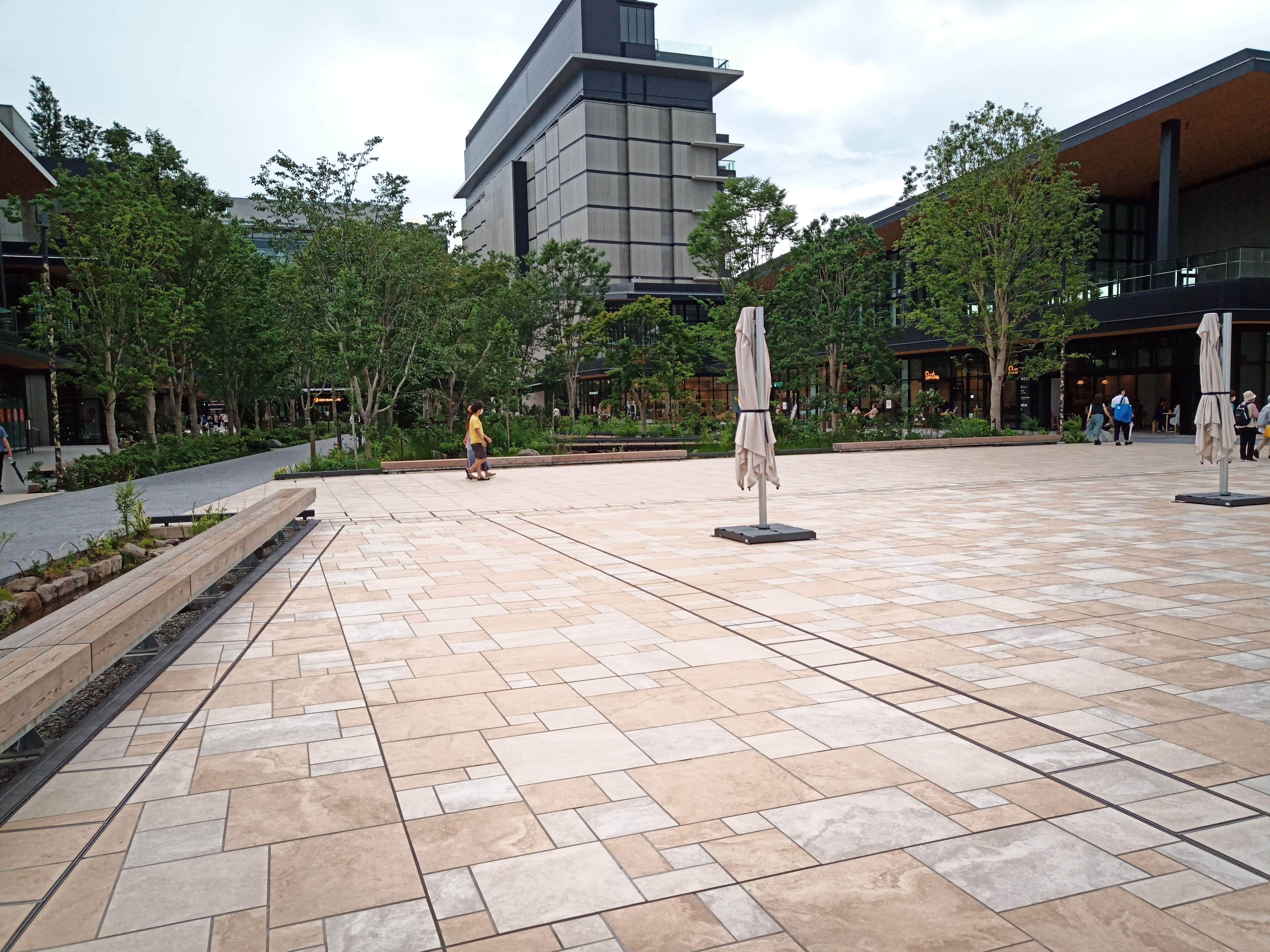 立川GREENSPRINGS内にて